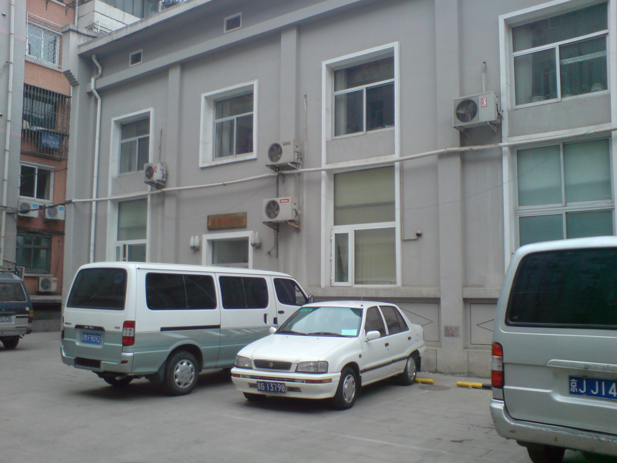 《炎黄春秋》杂志社编辑部位于北京西城区的办公楼